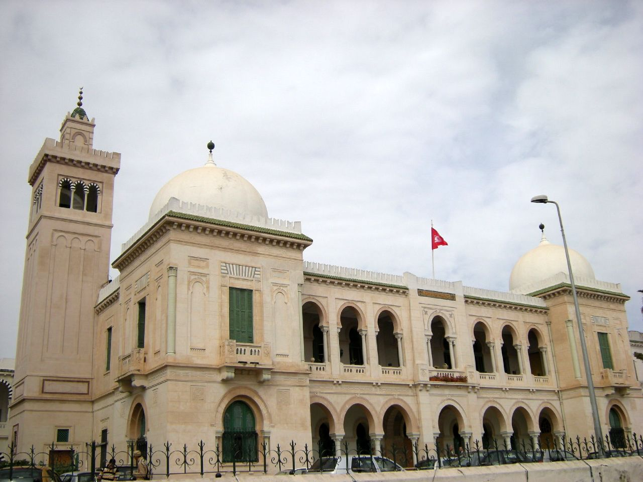 Tunis